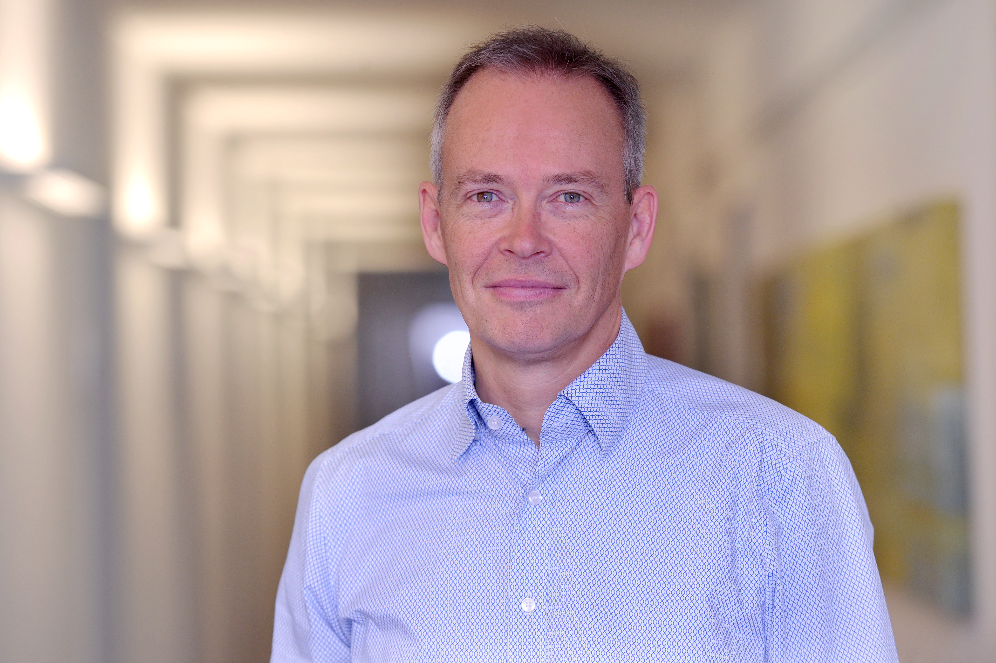 Datenschutz LfDI Mainz Foto: Kristina Schäfer, Mainz